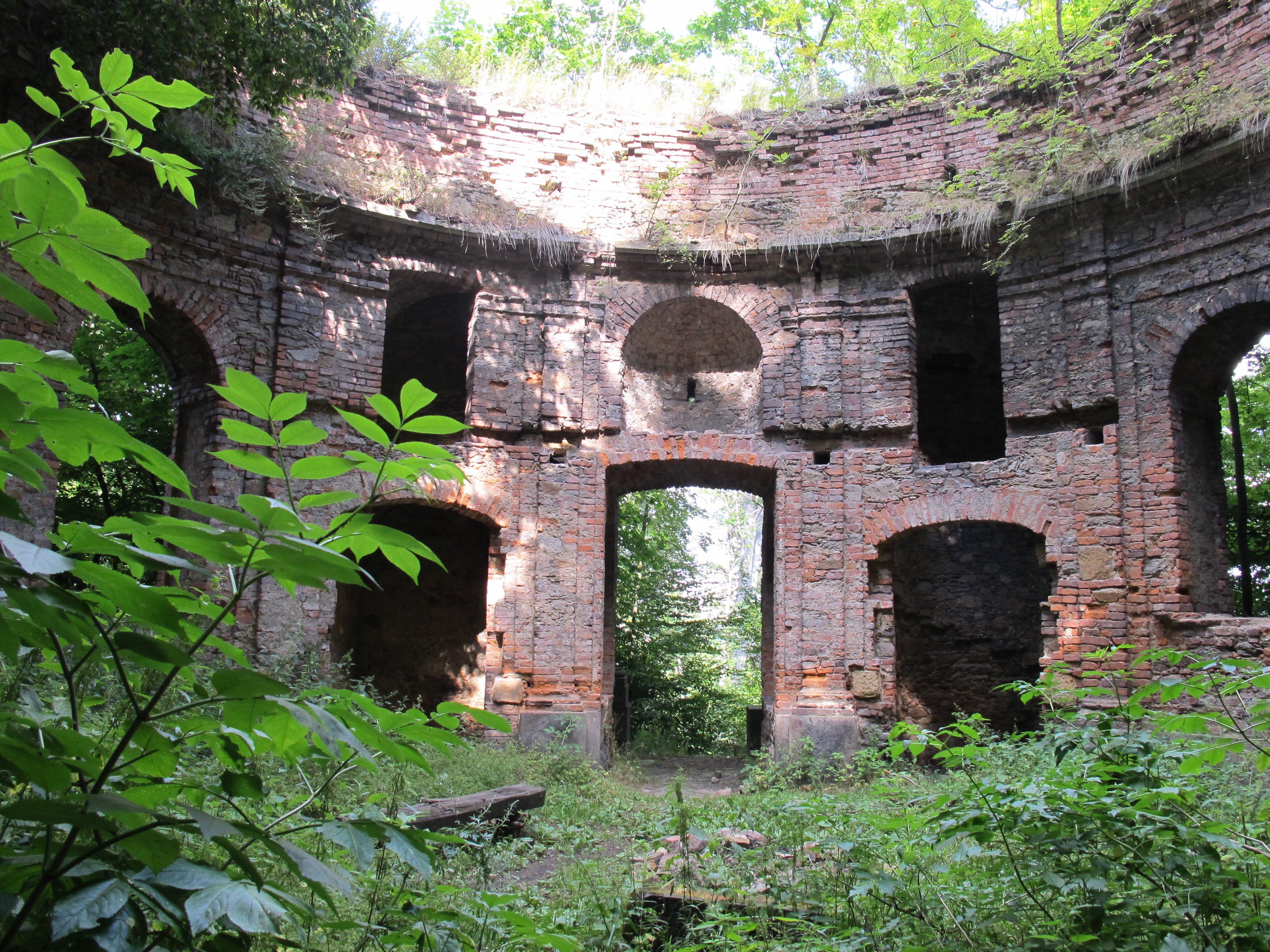 Hraběcí kaple, v lese, jihozápadně od areálu zámku, Jezeří (Horní Jiřetín).